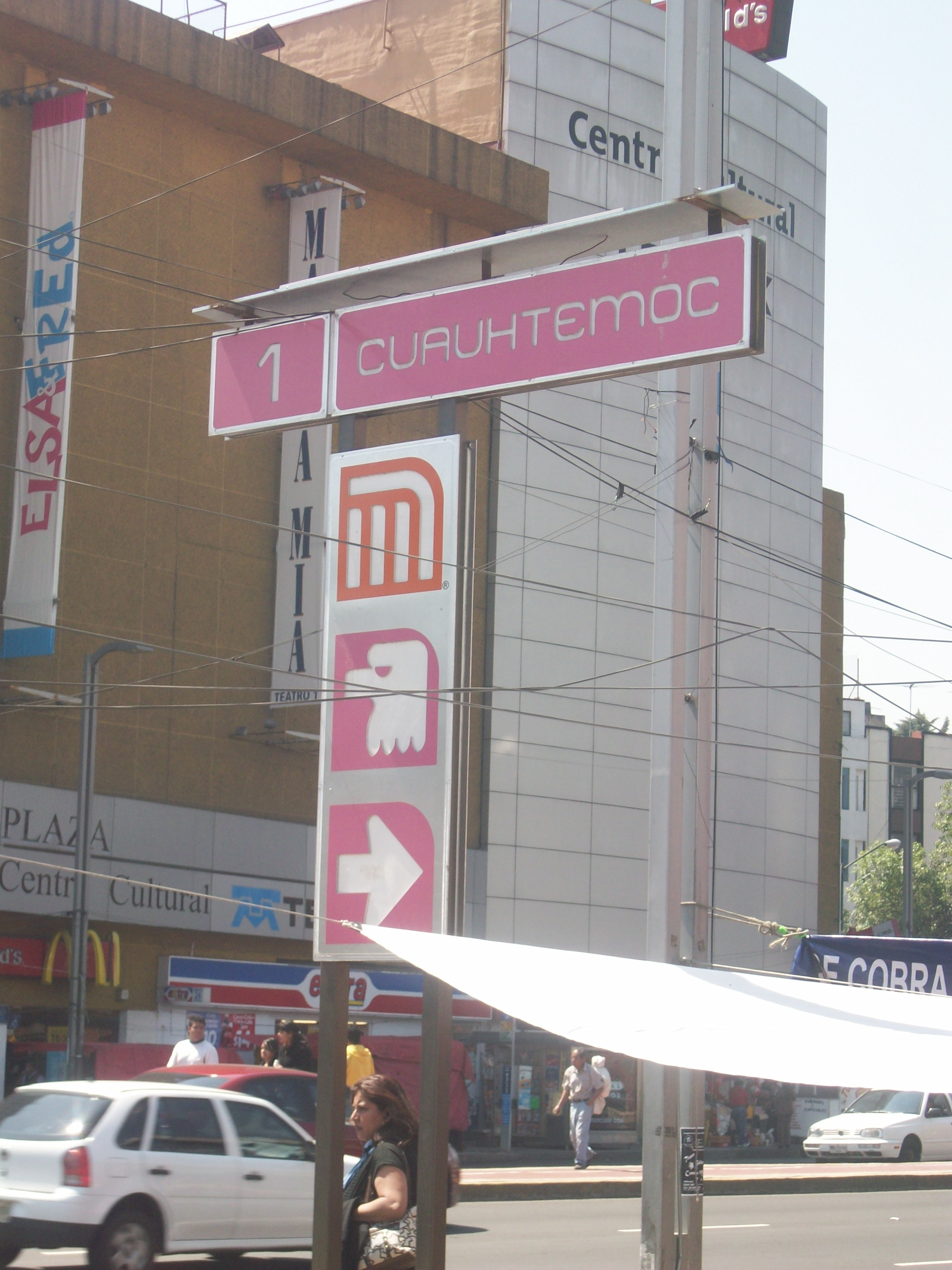 Letrero indicativo de la estación Cuauhtémoc